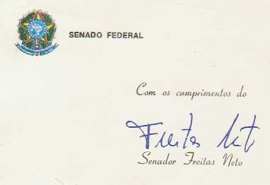 Assinatura do político brasileiro Antonio de Almendra Freitas Neto, ex-governador do Piauí.